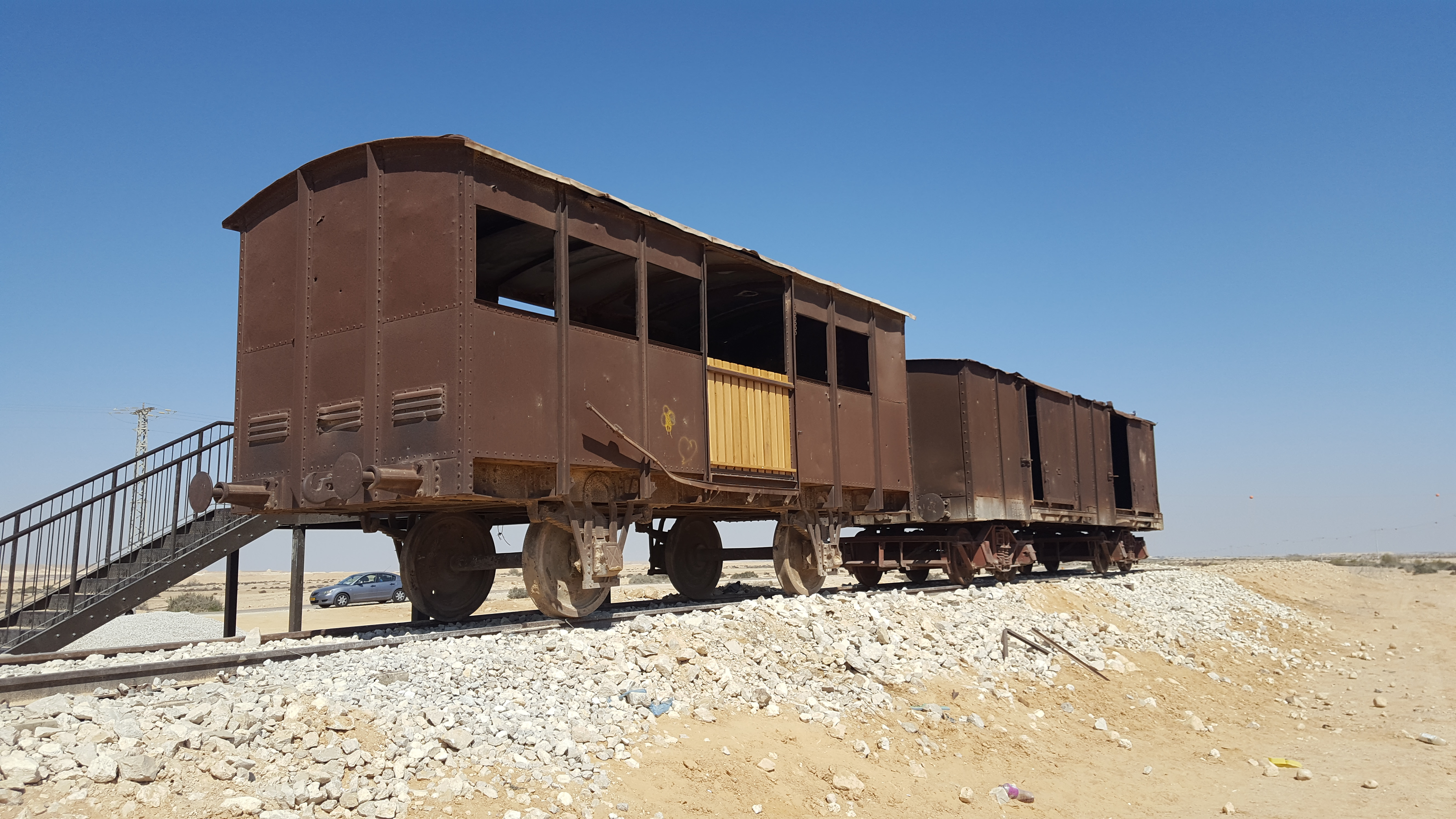 שיחזור הסוללה וקרונות המסילה הטורקית ליד עזוז